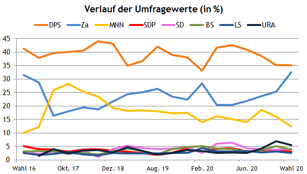 Umfagen zur Parlamentswahl in Montenegro 2020